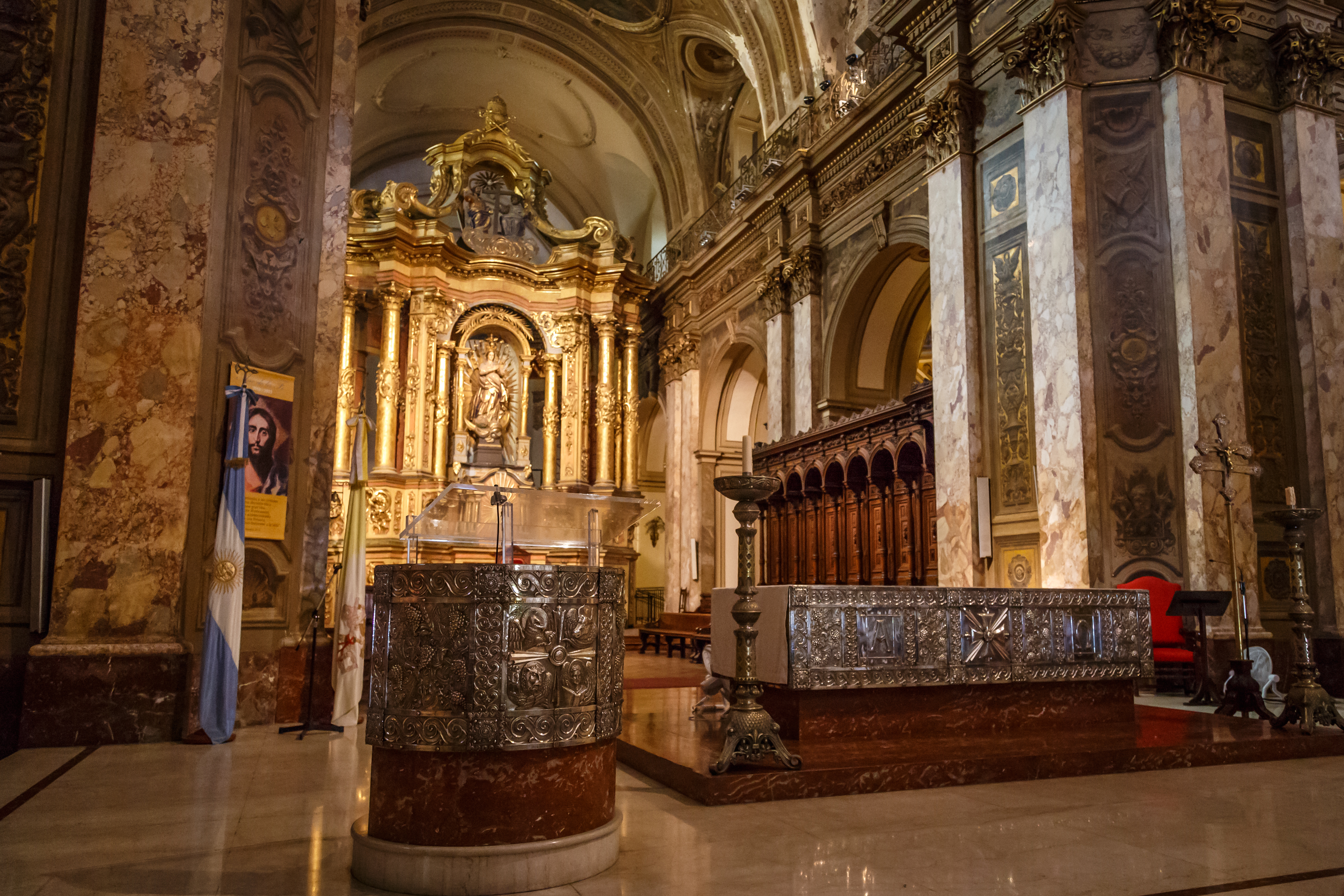 Interior de la Catedral Metropolitana de Buenos Aires. Altar Mayor.